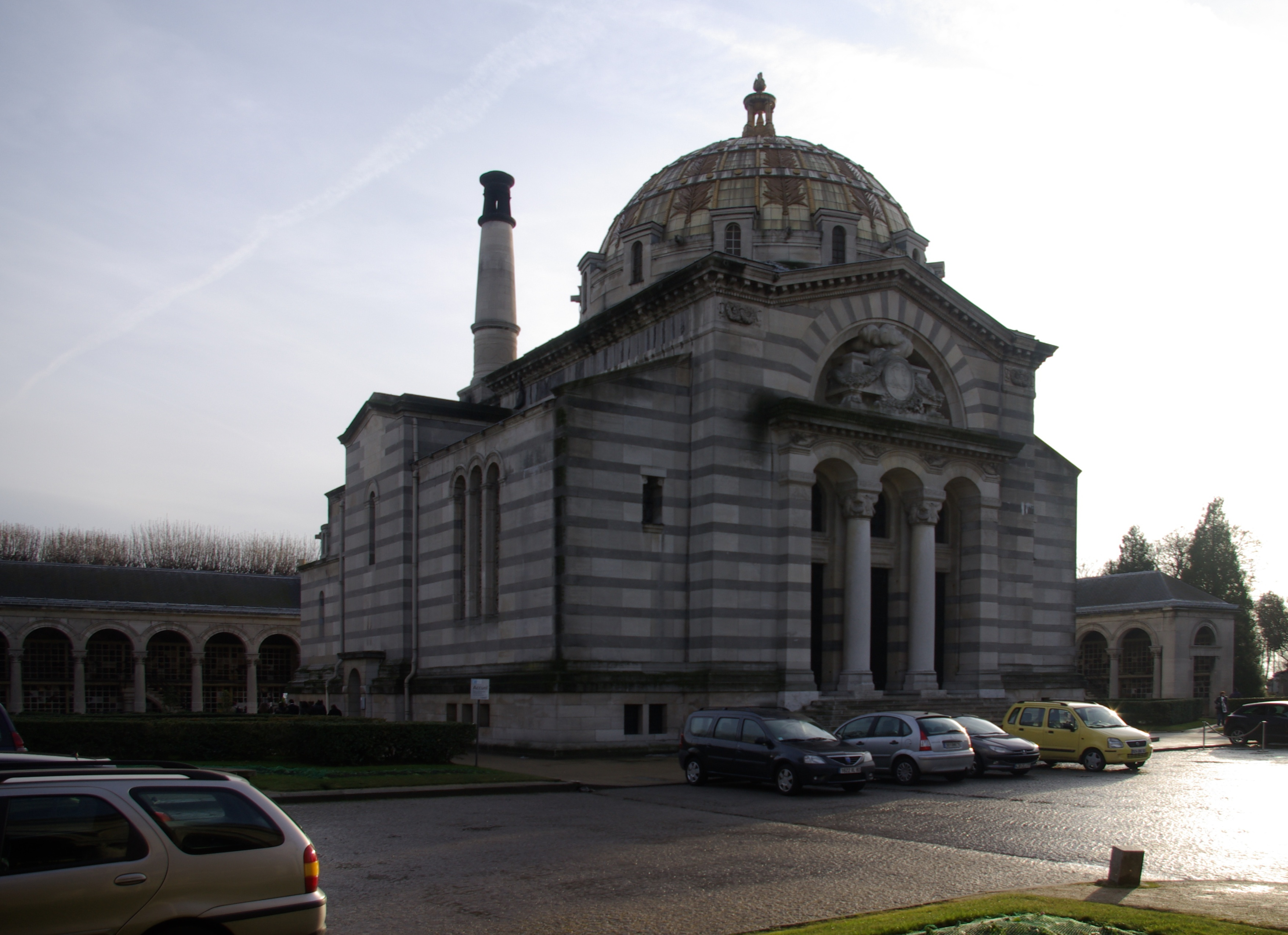 Krematorium auf dem Friedhof Père Lachaise in Paris